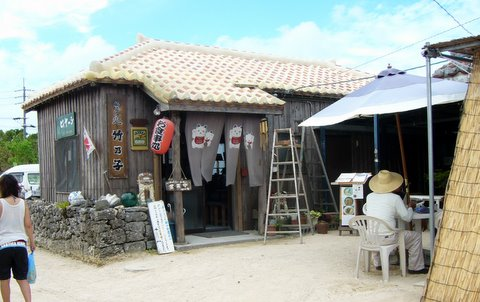 沖縄そば屋（沖縄県八重山郡竹富町竹富101-1、八重山そば・沖縄そばの店「竹乃子」）